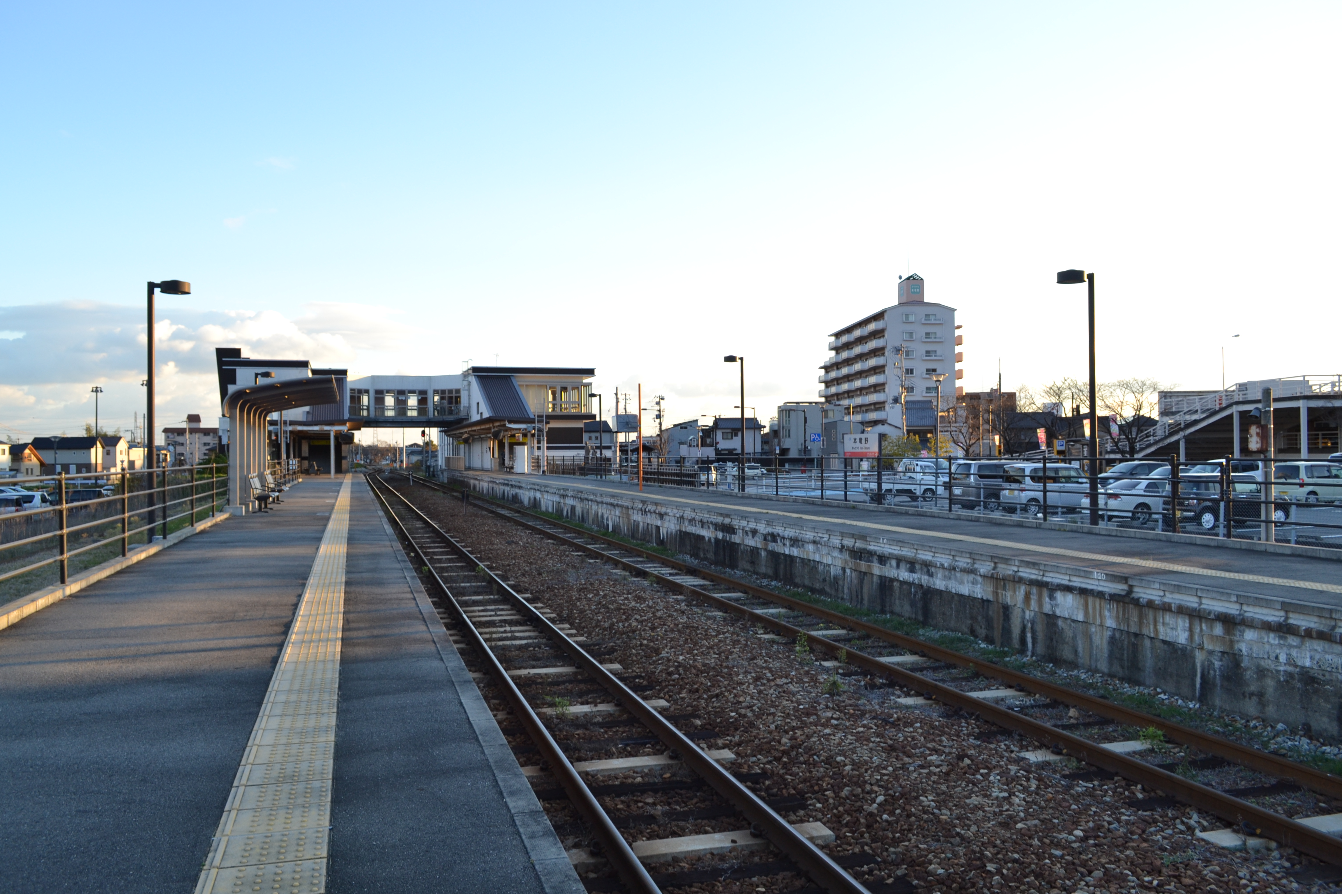 本竜野駅①番ホームから眺めるホーム全望